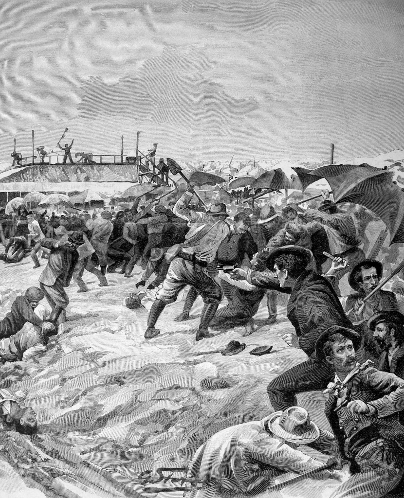 Aigues-Mortes massacre des italiens 1893 par G. Stern